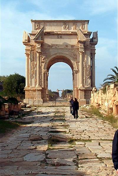 Leptis Magna le décumanus maximus et l'arc de Septime Sévère